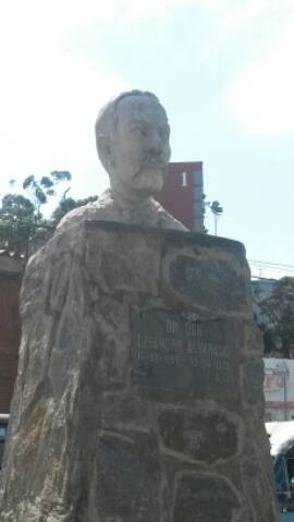 Estatua de Lisandro Alvarado situada en la Plaza Lisandro Alvarado